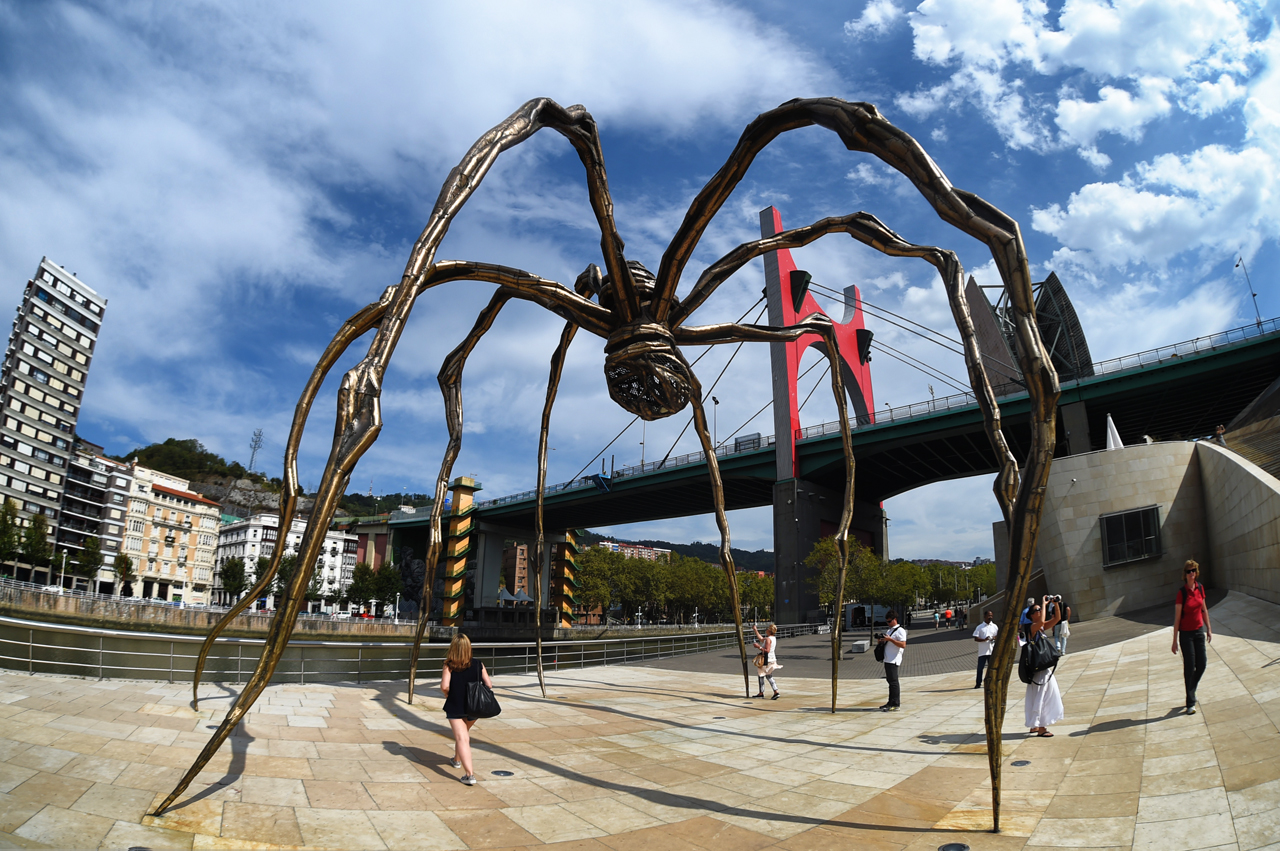 spider maman sculture 2014